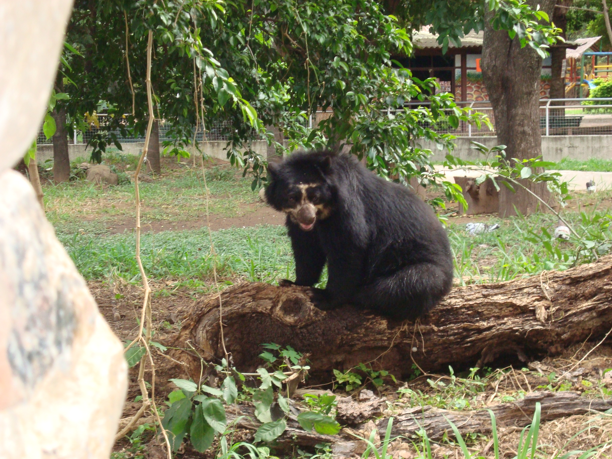 Se calcula que en Bolivia quedan alrededor de 1.500 ejemplares de osos andinos y se hace poco para preservarlos.